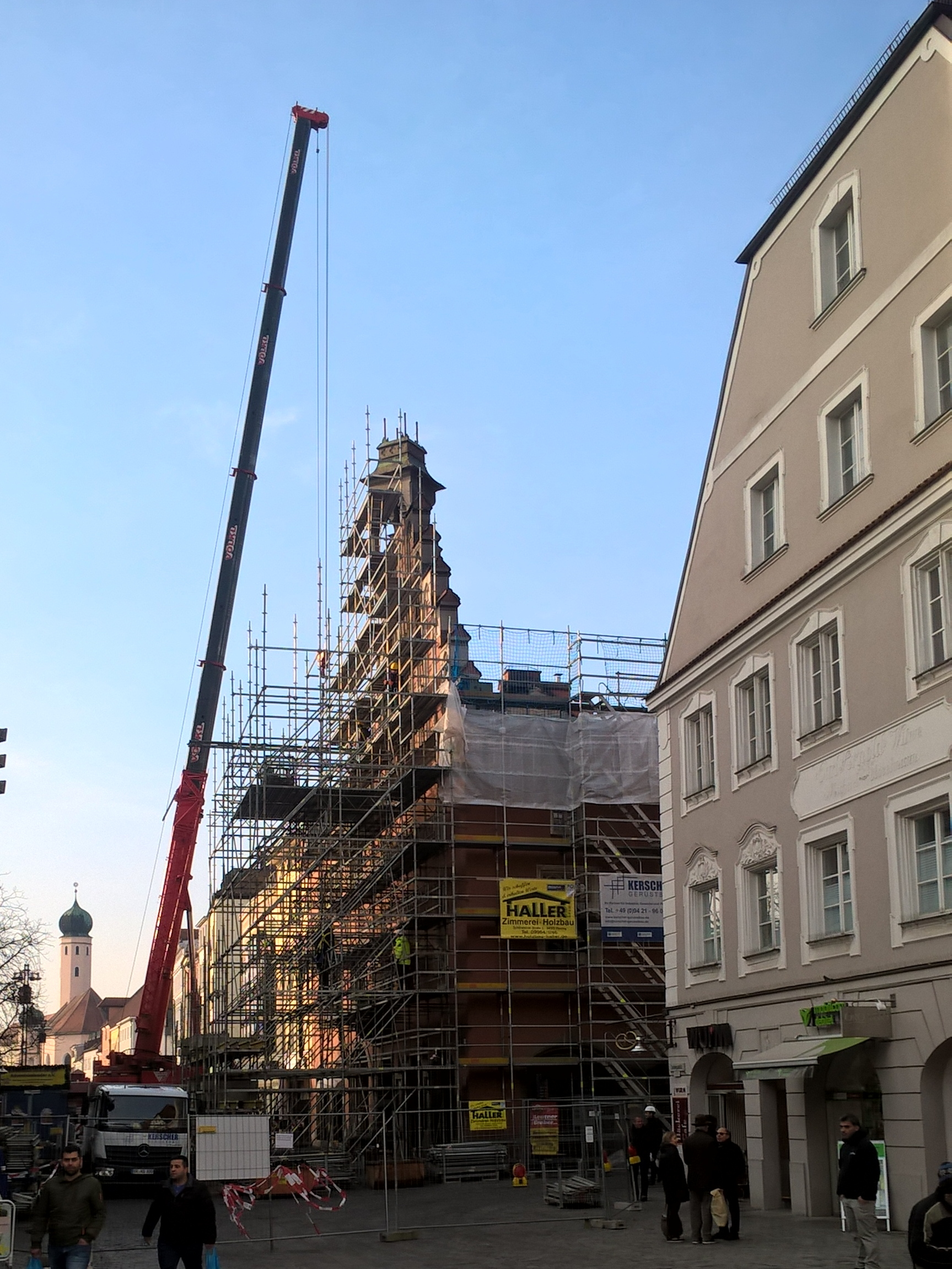 Das Rathaus Straubing einige Tage nach dem Brandschaden